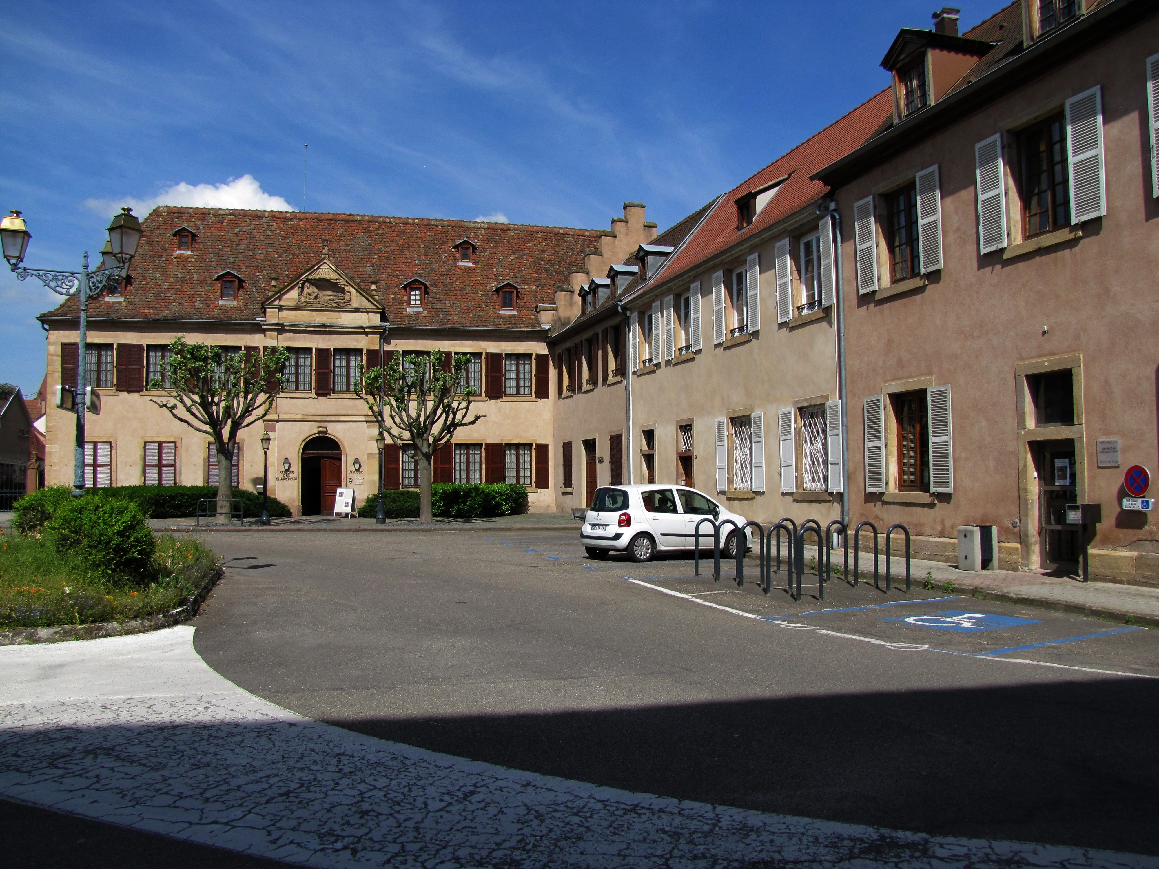 Alsace, Bas-Rhin, Couvent de chartreux dite "Chartreuse de Molsheim" (PA00084796, IA67006102).